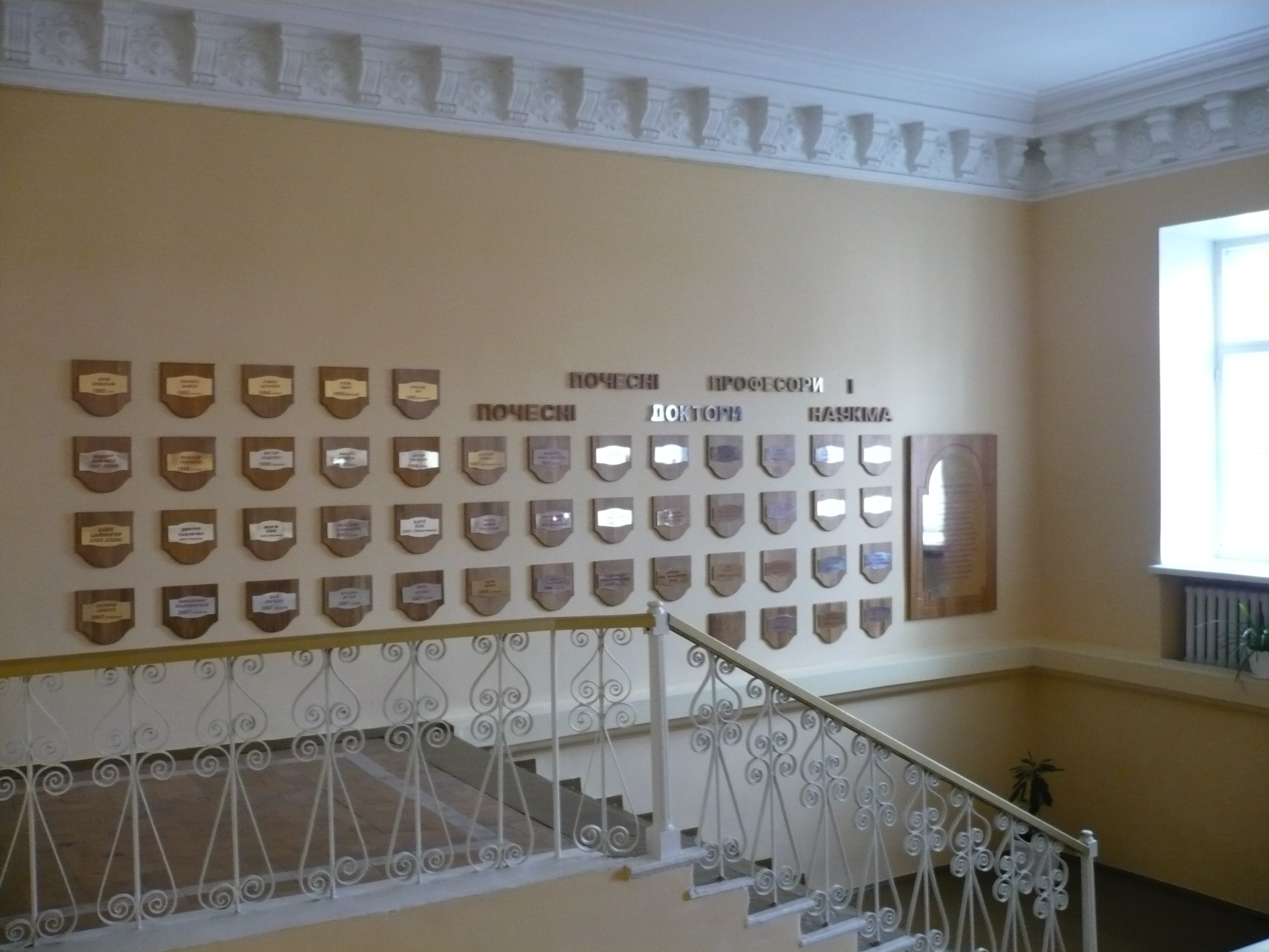 Почесні професори та доктори НаУКМА